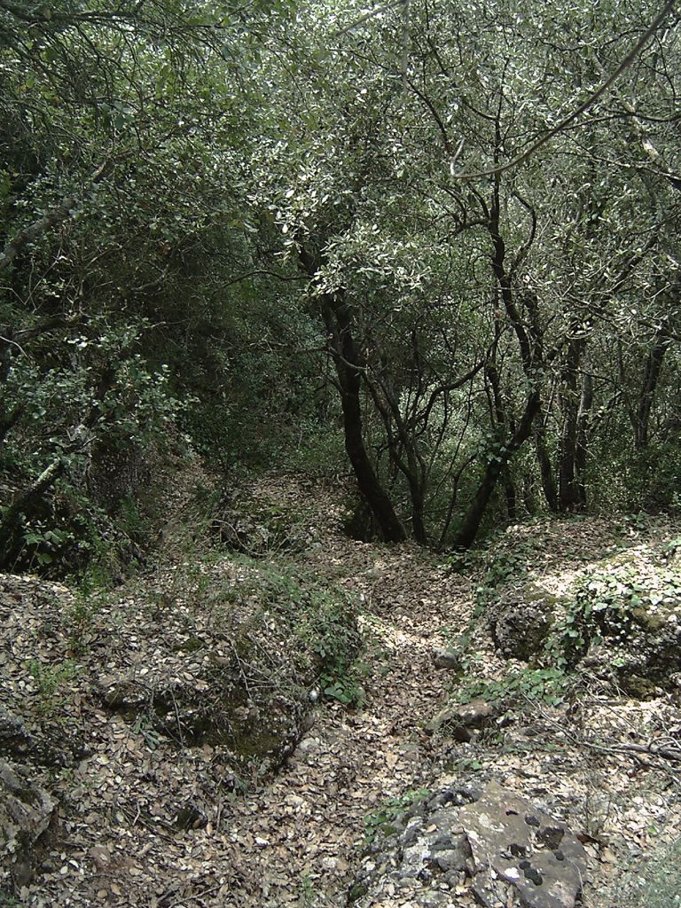 Parc Natural de Sant Llorenç del Munt i Serra de l'Obac. Vegetació característica de les zones altes d'obaga. Presa prop del Puig de la Balma en 2005. // Sant Llorenc del Munt and Serra de l'Obac. Characteristic vegetation of the shady mountainsides. 2005. Own picture, given to PD.